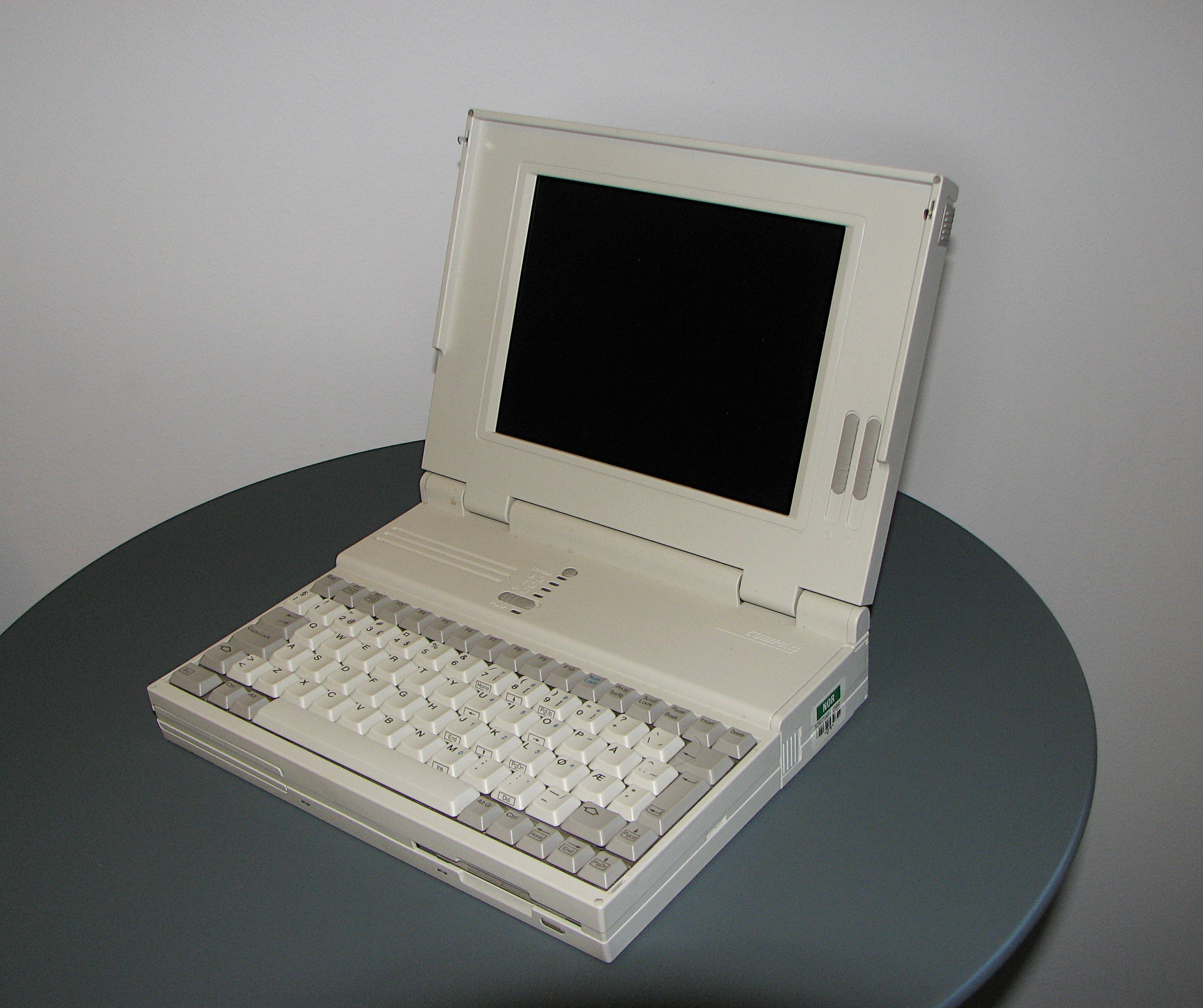 Compaq LTE 386.